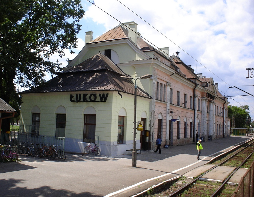 Stacja kolejowa w Łukowie.